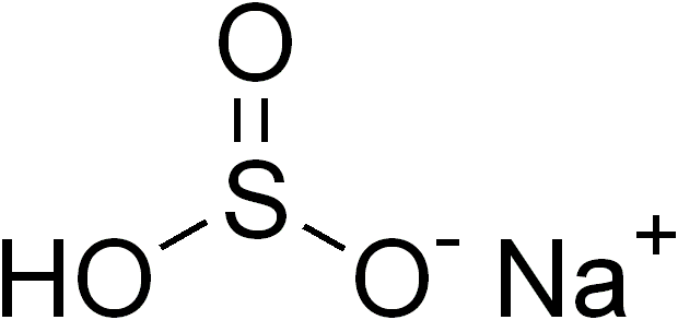 chemical structure of sodium bisulfite (bisulphite)